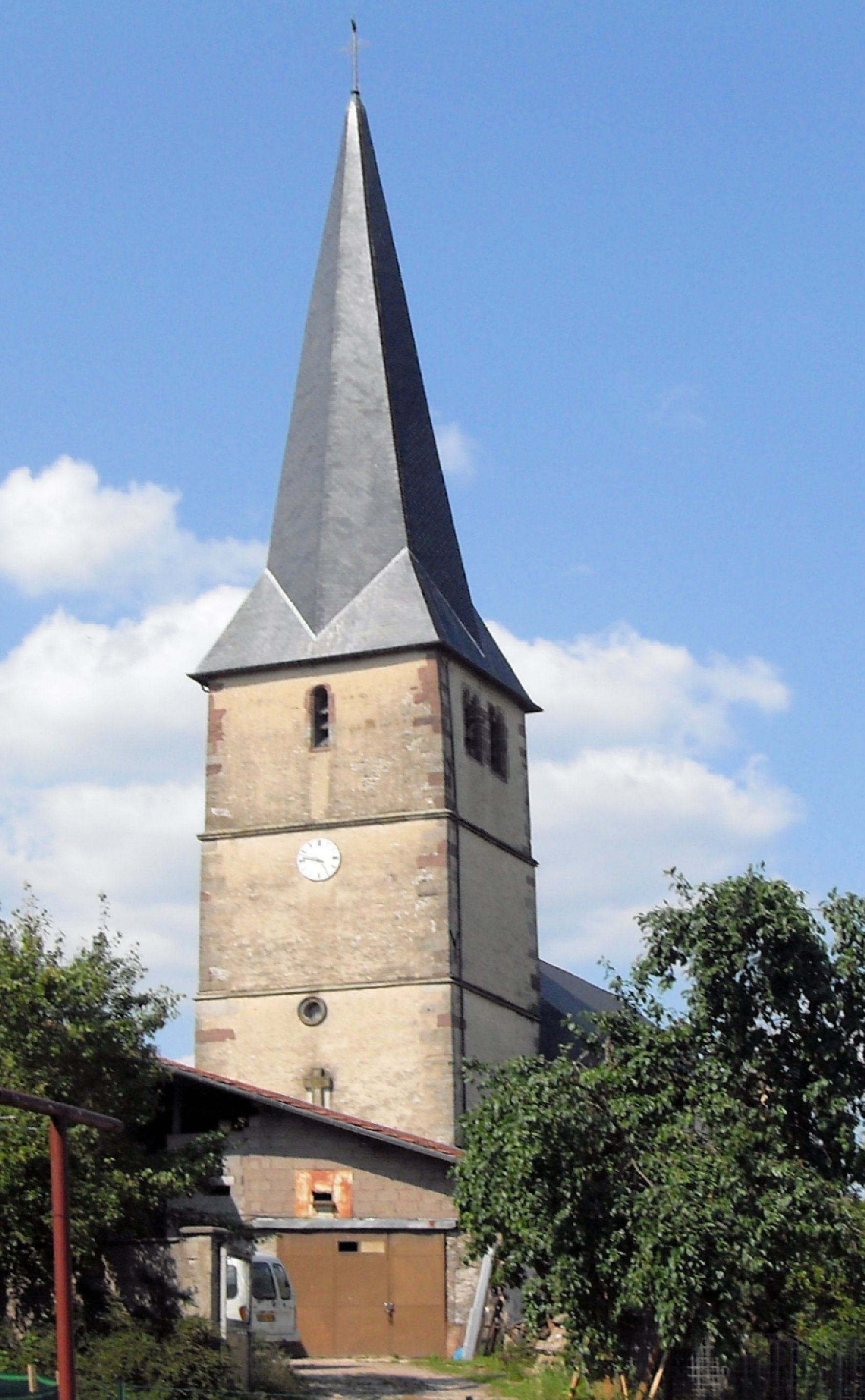 L'église Saint-Remy à Destord